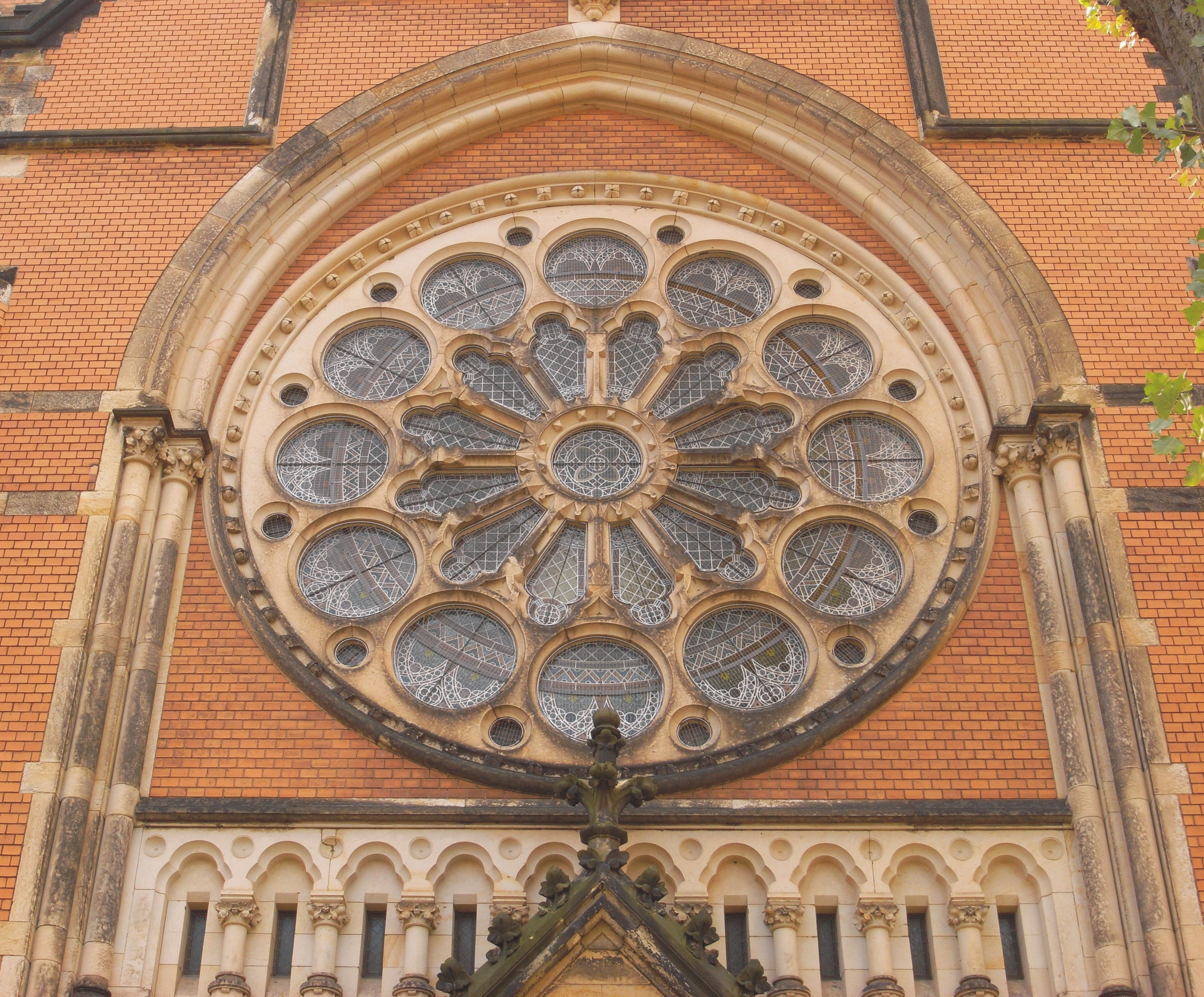 Heilig-Geist-Kirche in Dresden-Blasewitz, Fensterrosette am Westgiebel (Sachsen, Deutschland)